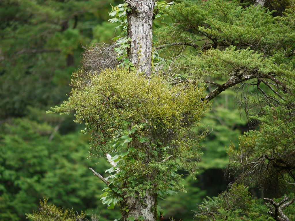 Taxillus kaempferi：マツグミ 2010/08/08 和歌山県北山村：Kitayama V. Wakayama pref. Japan